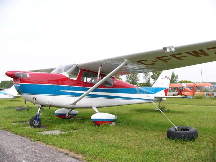 Cessna 175A Skylark (C-FFWZ) en el aeródromo de Rockcliffe, Ontario, Canadá